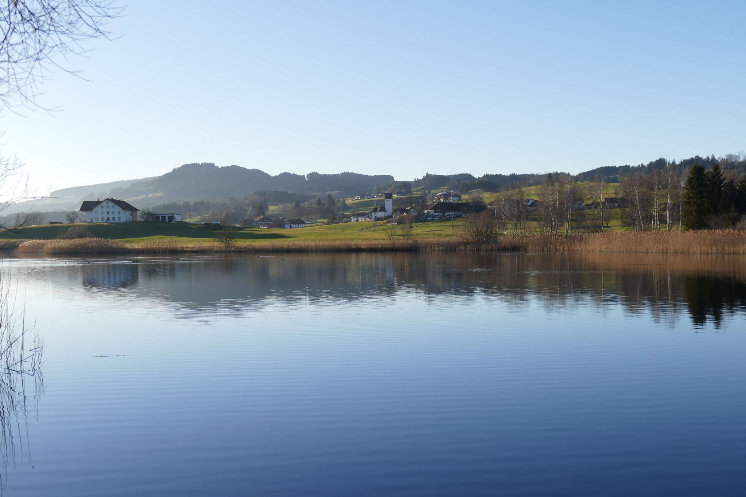 Memhölz etwa von Gerats mit See und Friesinsel